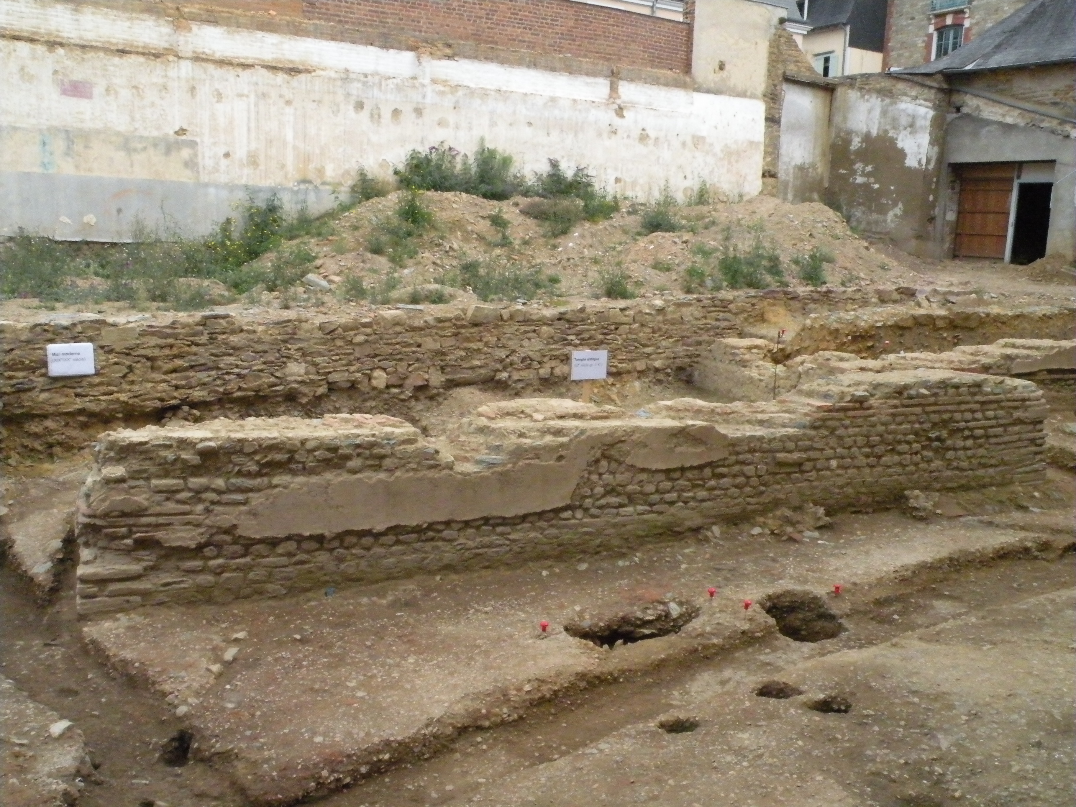 Fouilles du couvent des Jacobins de Rennes lors des Journées du Patrimoines. Fondations probable d’un temple antique dans la cour nord.